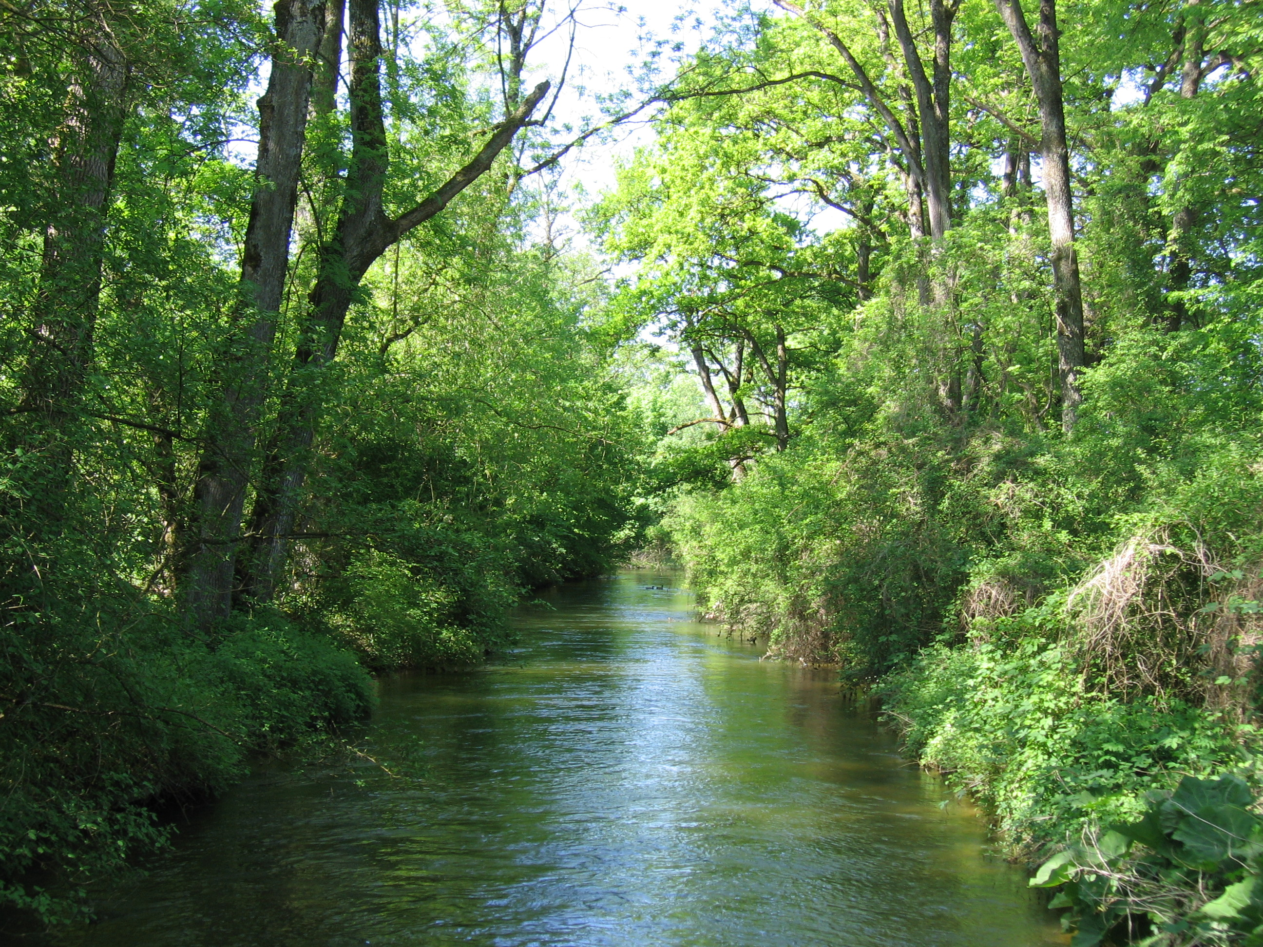 Deutschland - Baden-Württemberg - Bodenseekreis - Langenargen: der von der Argen ausgelassene Mühlenkanal